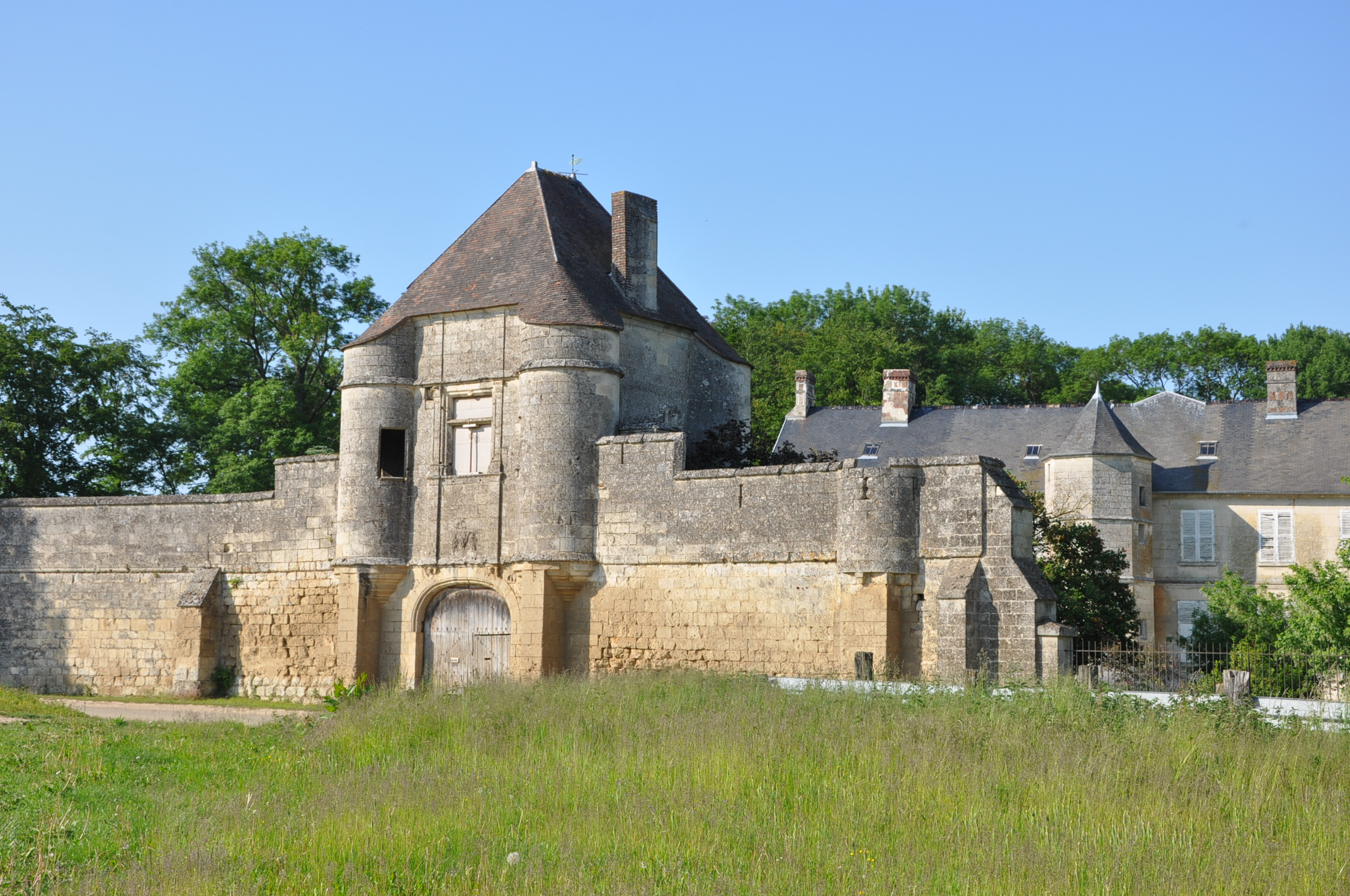 Château de Noüe